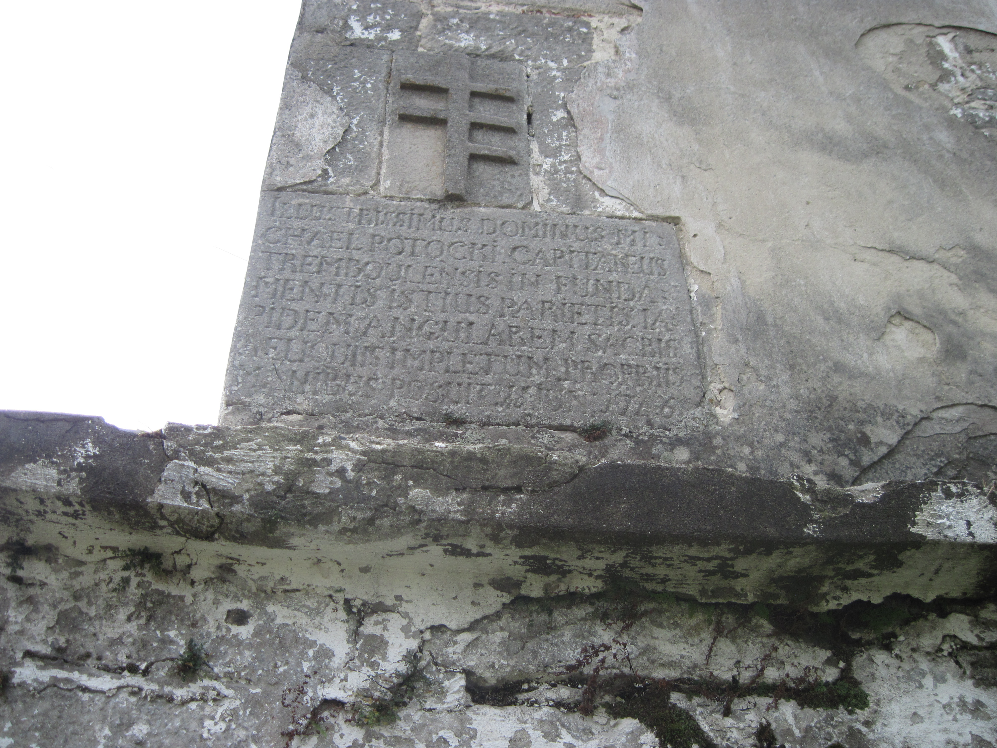 Пам'ятна дошка, монастир, Підкамінь